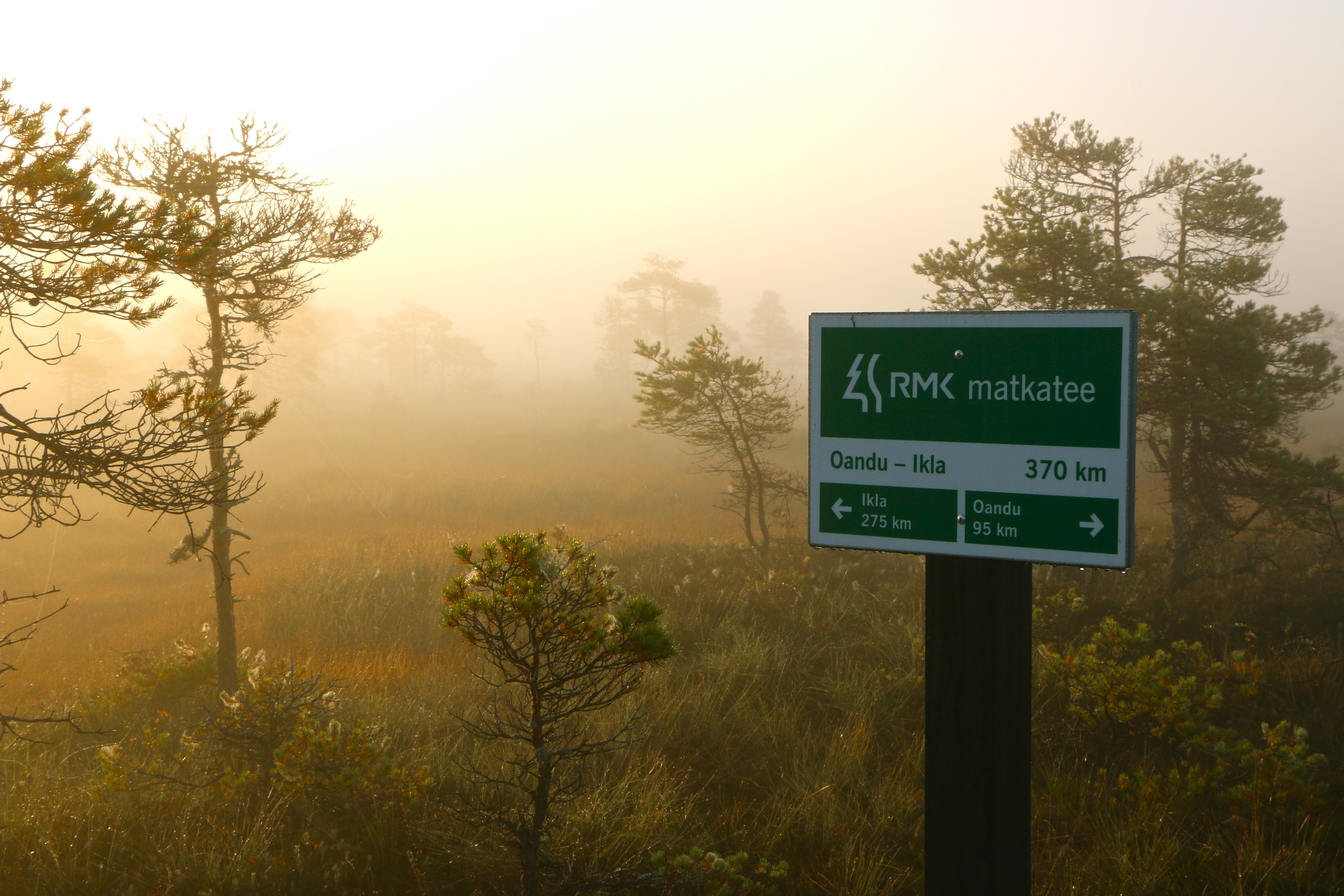 Udune päikesetõus Kakerdaja rabas